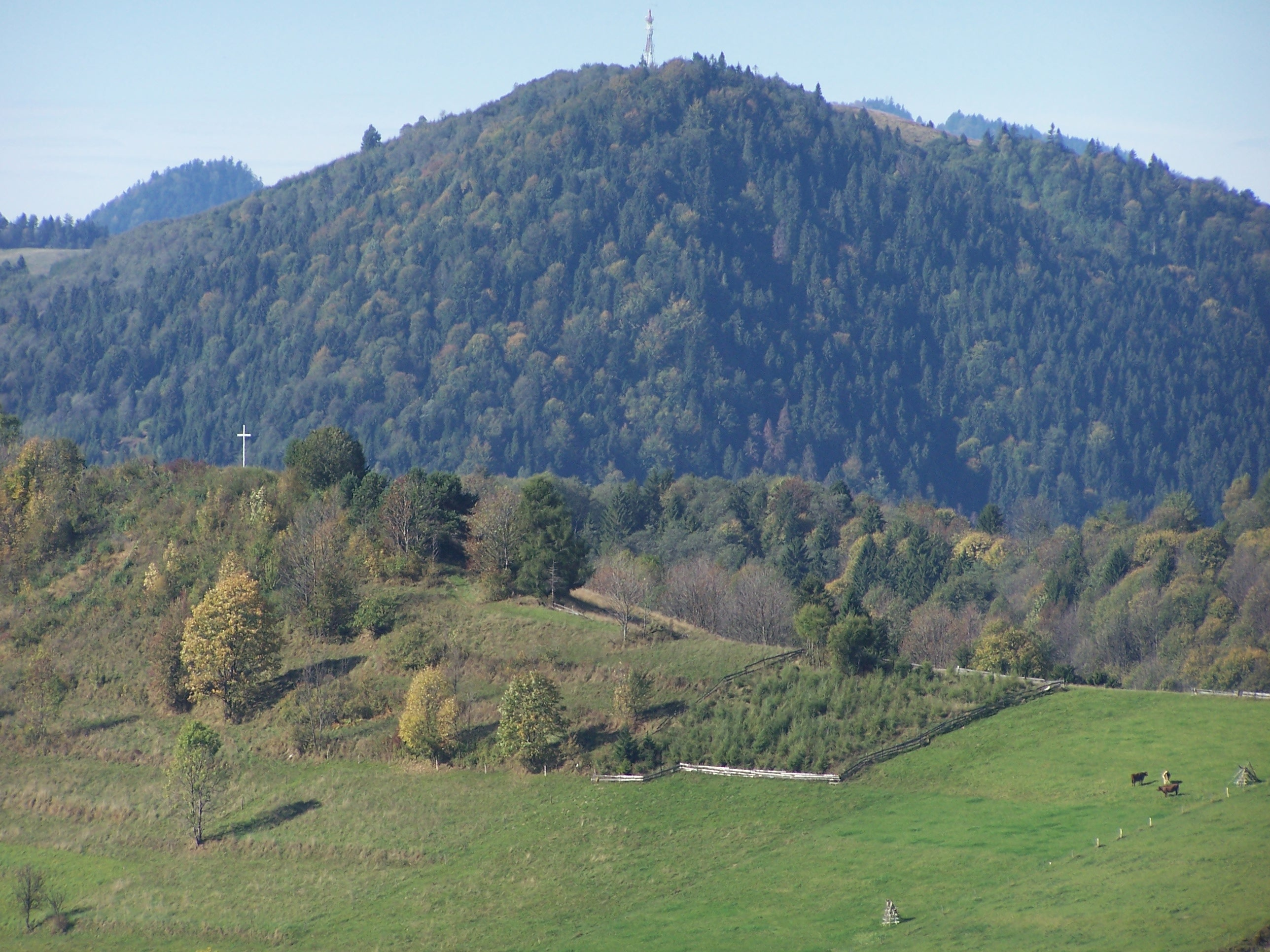 Widok od wschodniej strony na Opałtę i Jarmutę